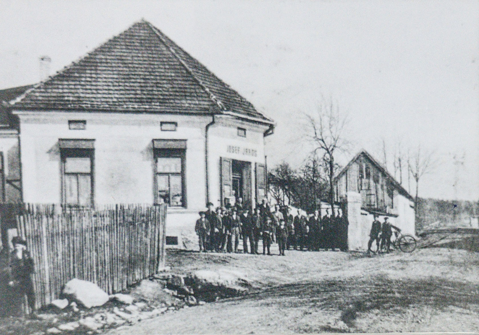 Rok 1925